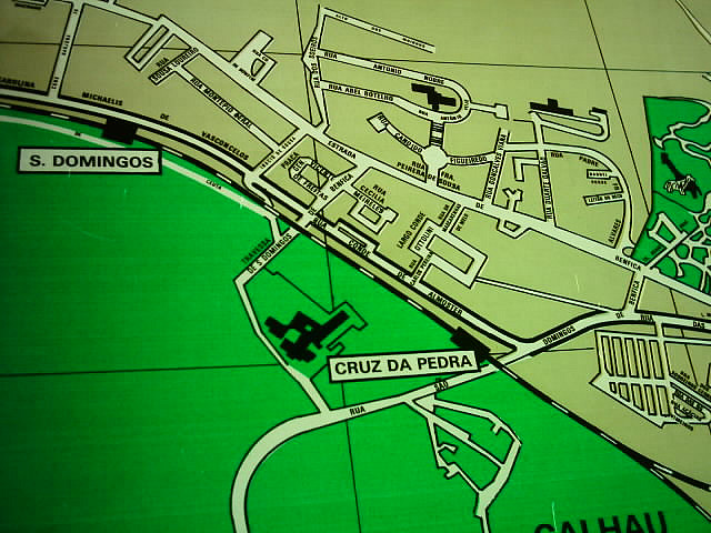 Antigos apeadeiros da Linha de Sintra: São Domingos de Benfica e Cruz da Pedra (Lisboa), em mapa editado pela CML em 1983 (mapa ainda em uso em 2012).